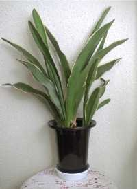 Rohdea japonica "Omoto"